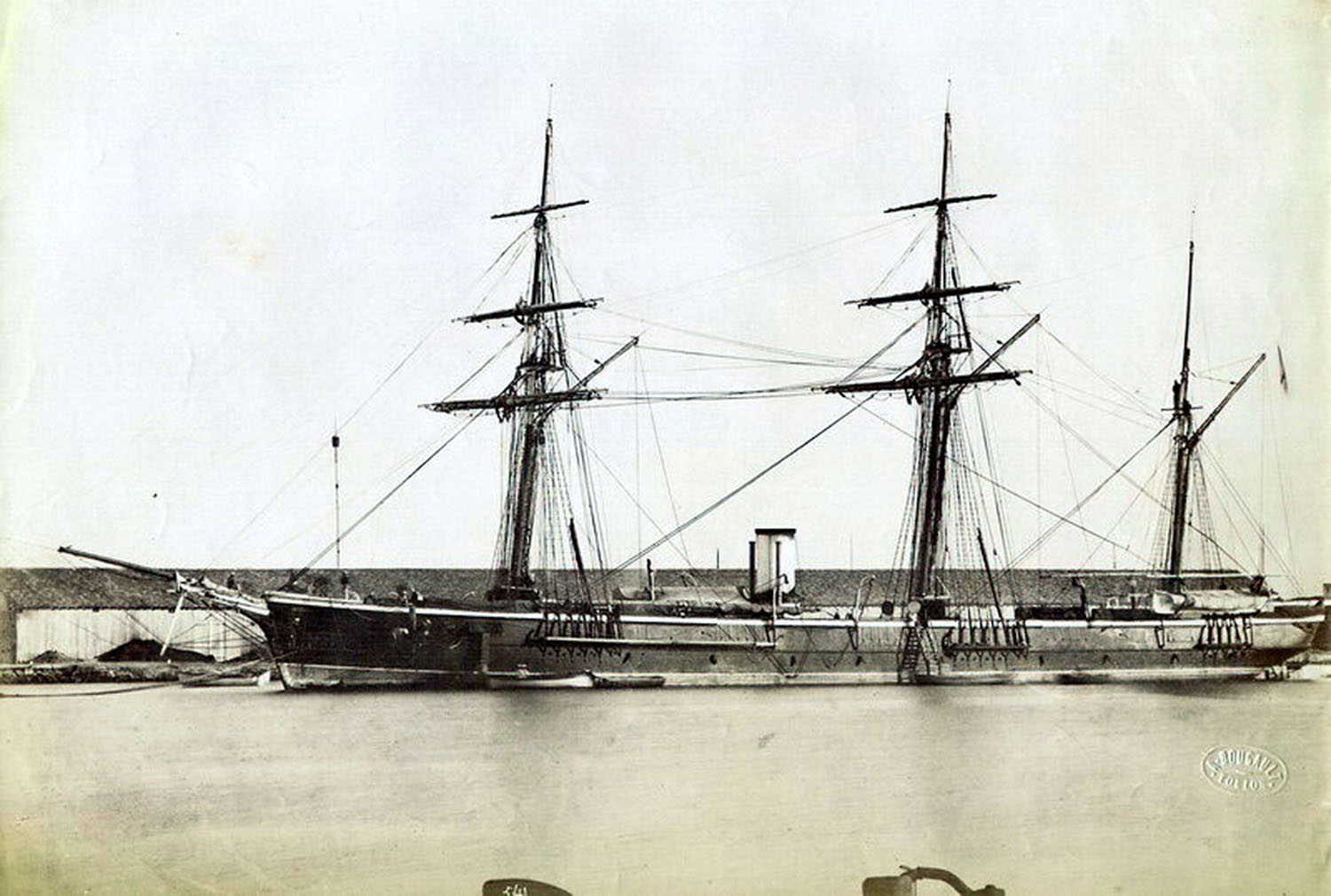 Фотография клипера Русского императорского флота "Всадник" (заложен в 1859 году, пущен на слом в 1881 году).